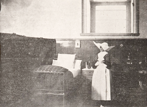 Lecho del Hospital en la sala de San Carlos en que murió el poeta (Pedro Antonio González). Hermana de la caridad sor Mercedes , que lo asistió. Hospital de San Vicente de Paul en Santiago de Chile (1903).